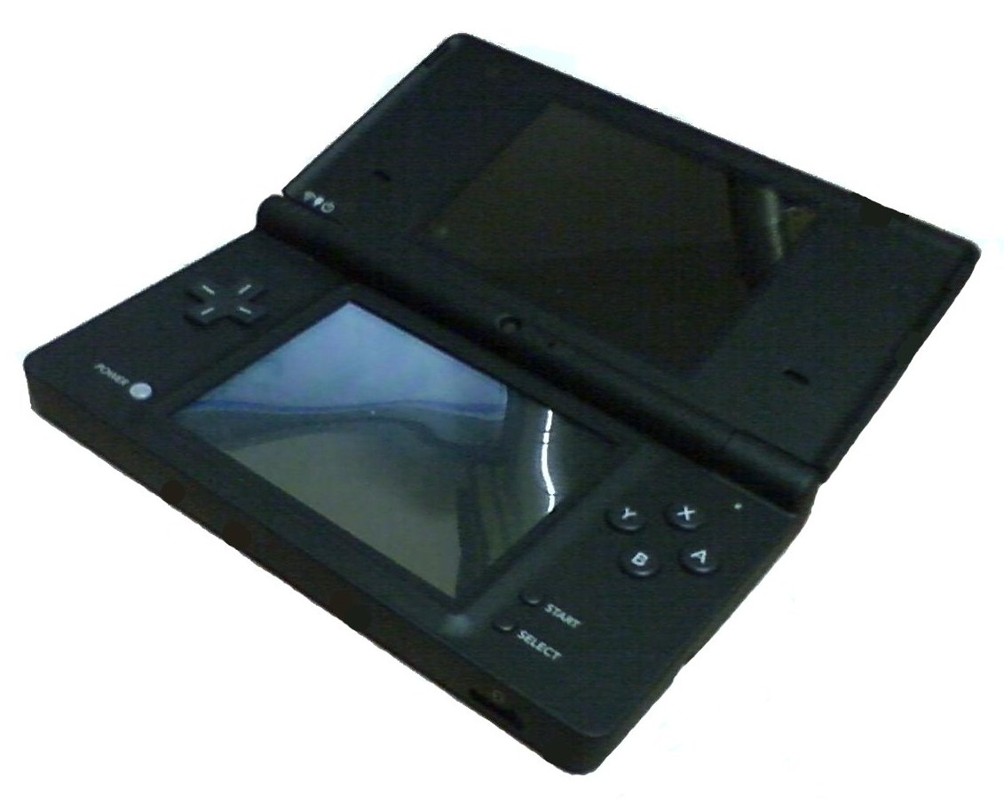 Una Nintendo DSi Negra.